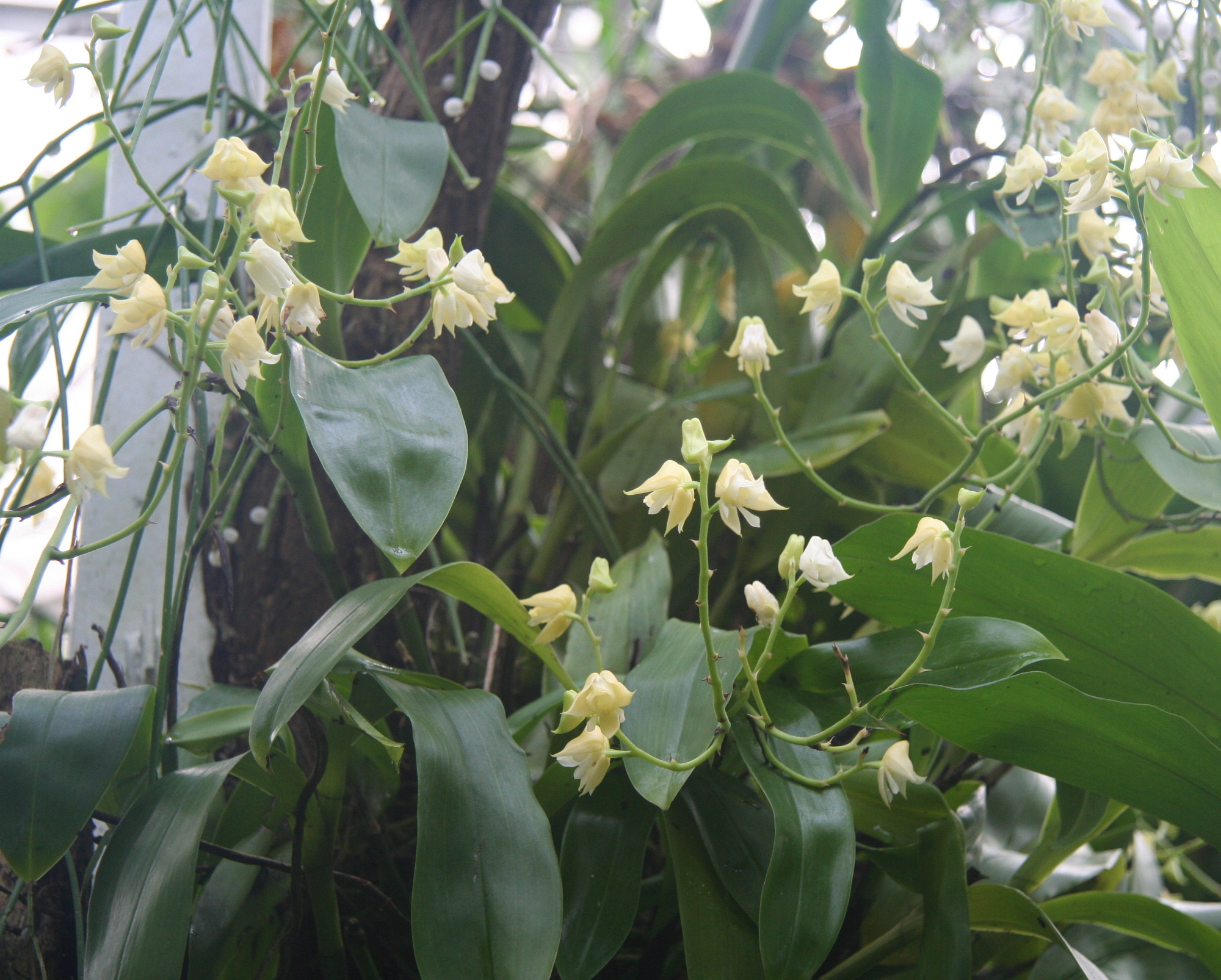 Polystachya laxiflora im Botanischen Garten Dresden